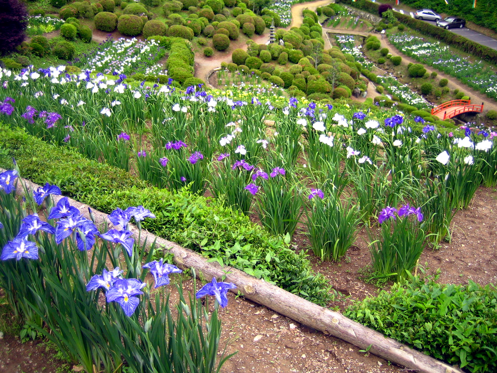 Iris park in Mt. Makiyama